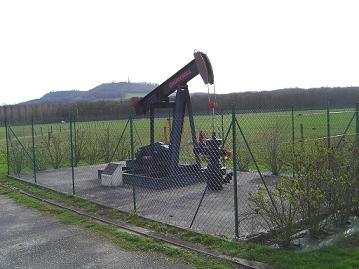 FORCELLES Vue Puit de Petrole et SION